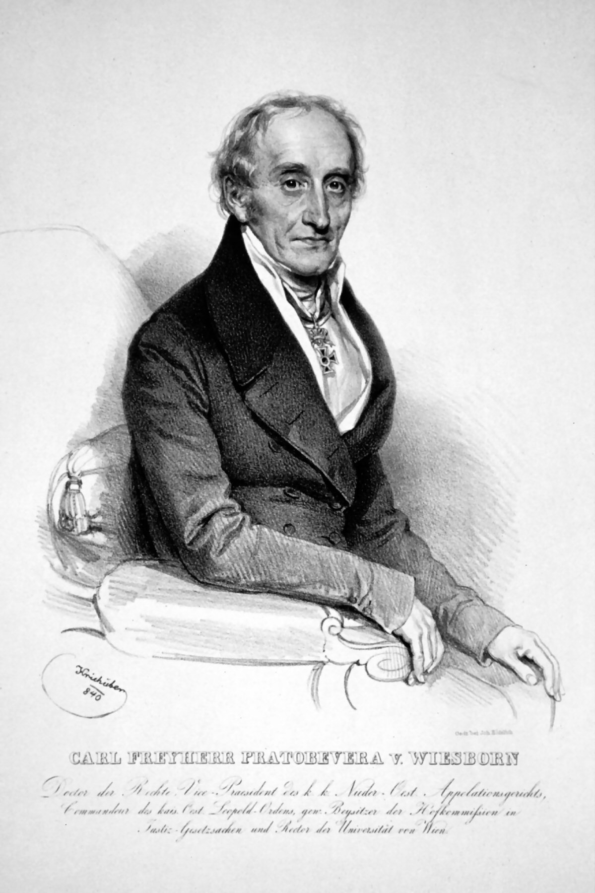 Karl Josef Freiherr von Pratobevera-Wiesborn (1769-1853), österreichischer Jurist und Politiker. Lithographie von Josef Kriehuber, 1840